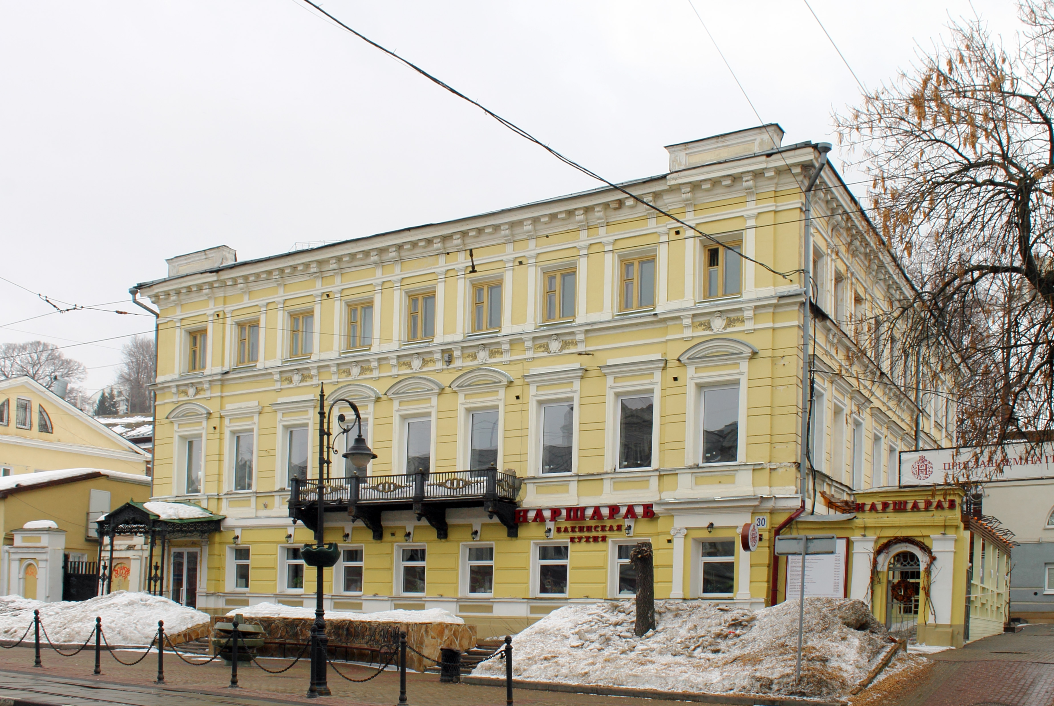 Особняк купца Блинова: улица Рождественская, 30, Нижний Новгород, Нижегородская область